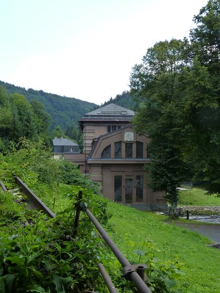 pohled na elektrárnu.